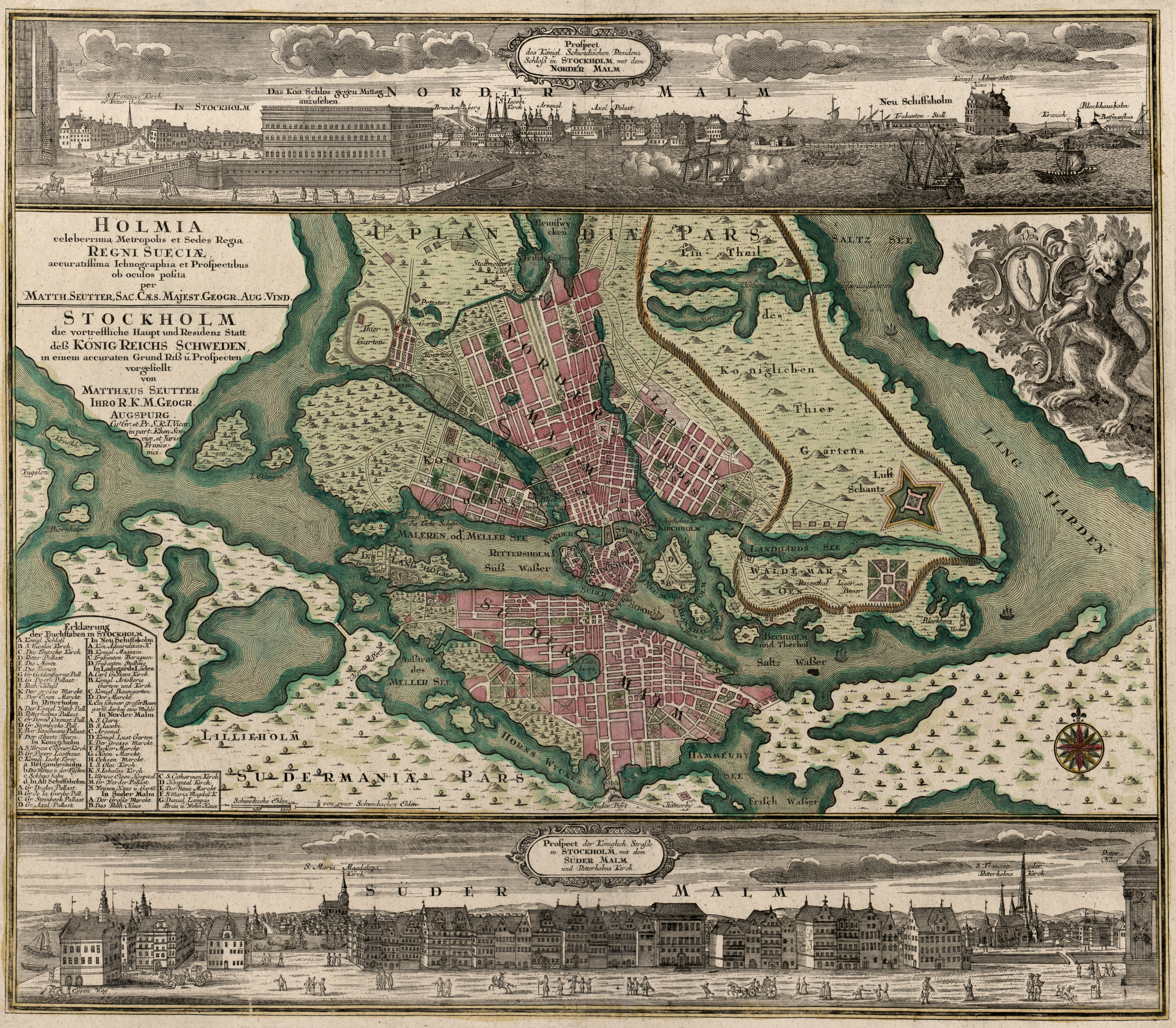 Karta över Stockholm med omgivning